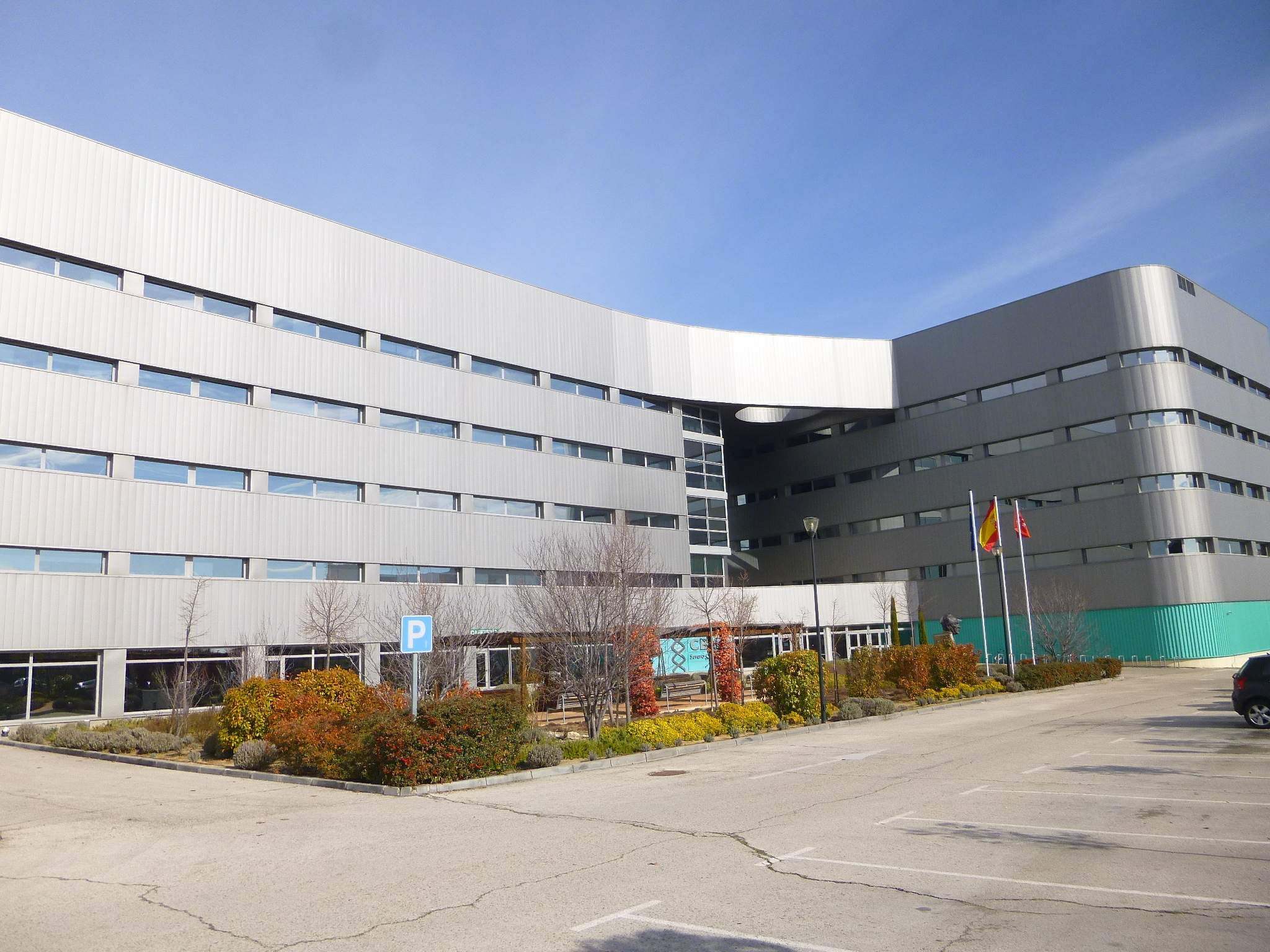 Madrid - Centro de Biología Molecular (CBM) Severo Ochoa